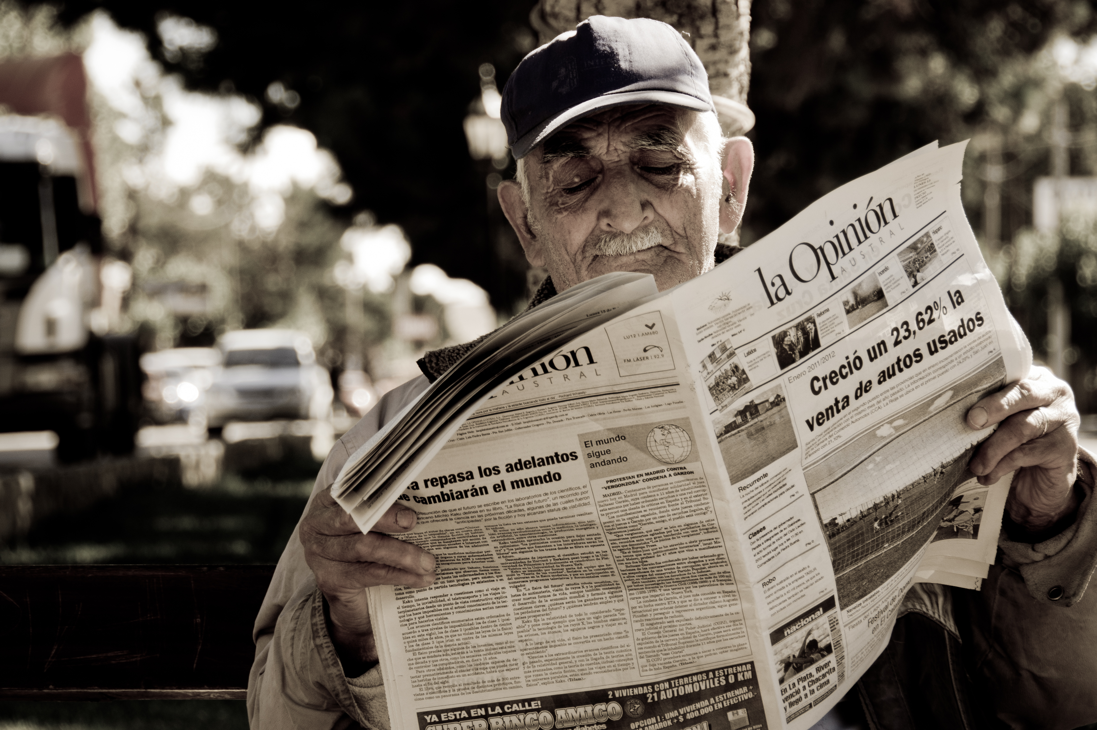 Provincia de Santa Cruz, Argentina.